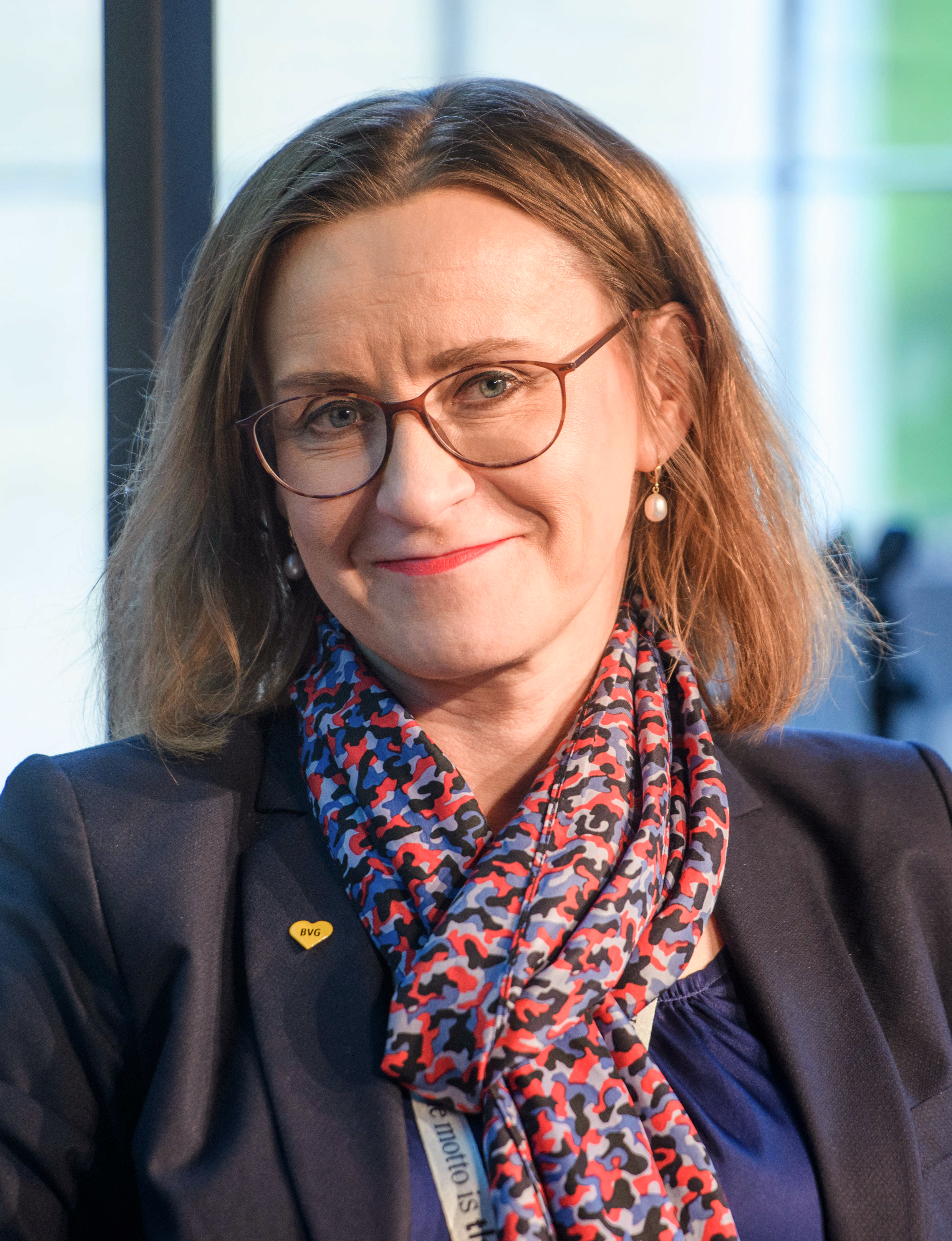 Session: Mobil mobil? Die Mobilität der Zukunft ist mehr als ein digitales Roadmovie! Speaker: Stephan Rammler, Sigrid Evelyn Nikutta, Dirk Meyer, Hanna Gersmann